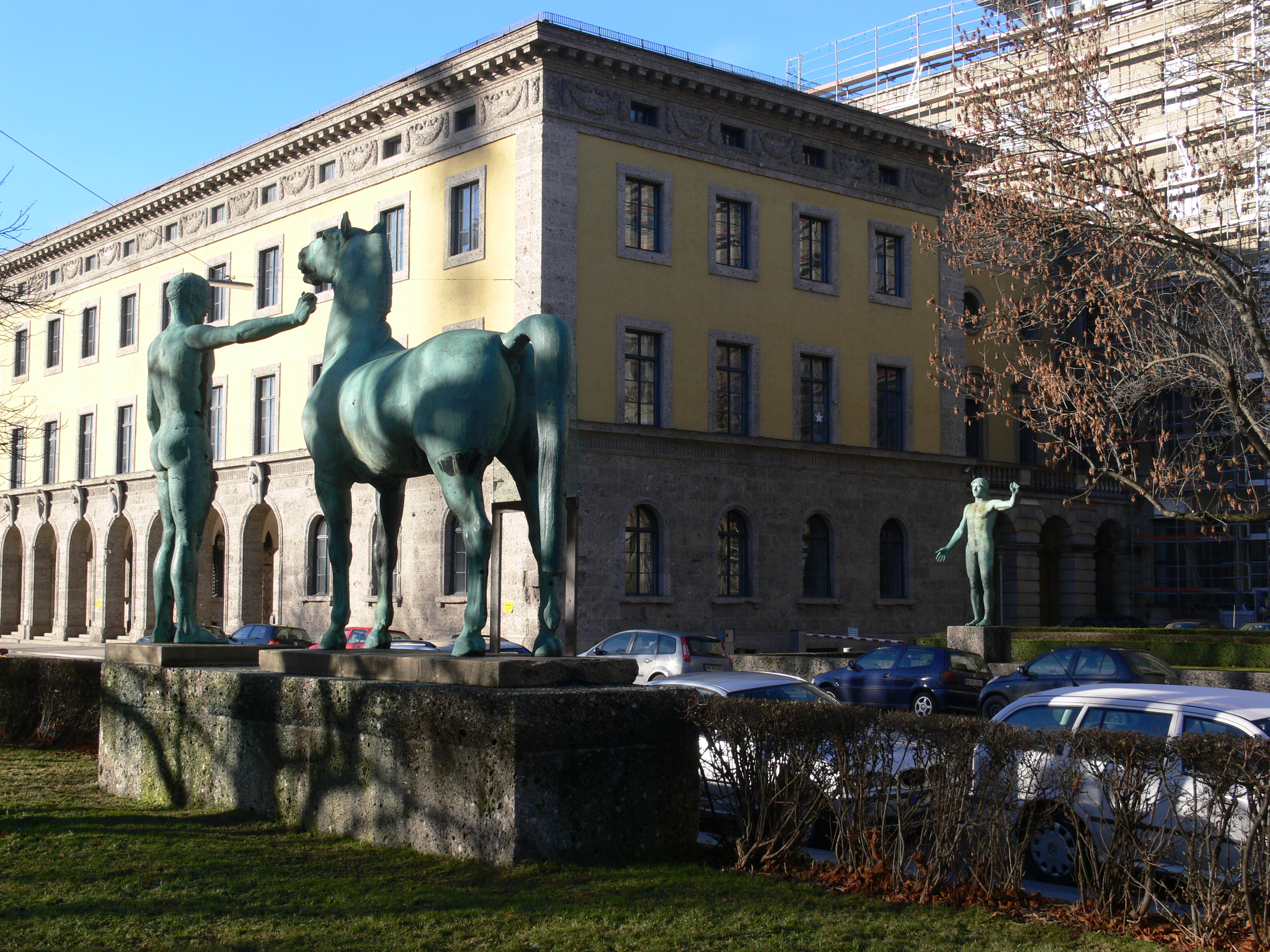 München, Arcisstraße, vorne links: Rossebändigergruppe von Hermann Hahn - 1931, hinten rechts Rossebändiger von Bernhard Bleeker (als Einzelfigur ohne Pferd aufgestellt) vor der Technischen Universität